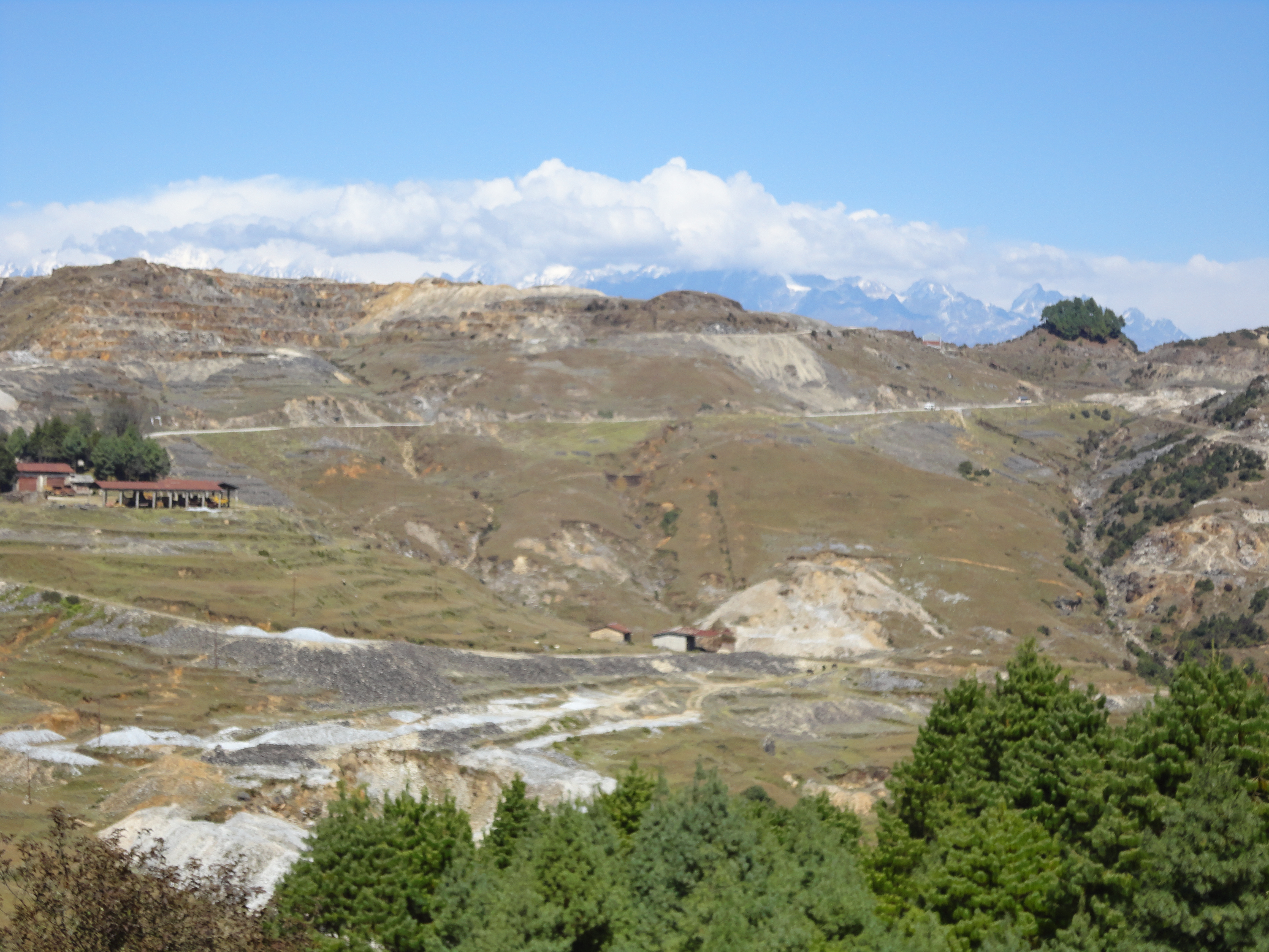 नेपाली: khari dhunga